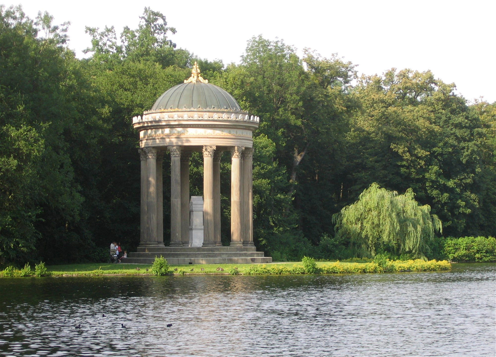 Apollotempel im Schlosspark Nymphenburg, München